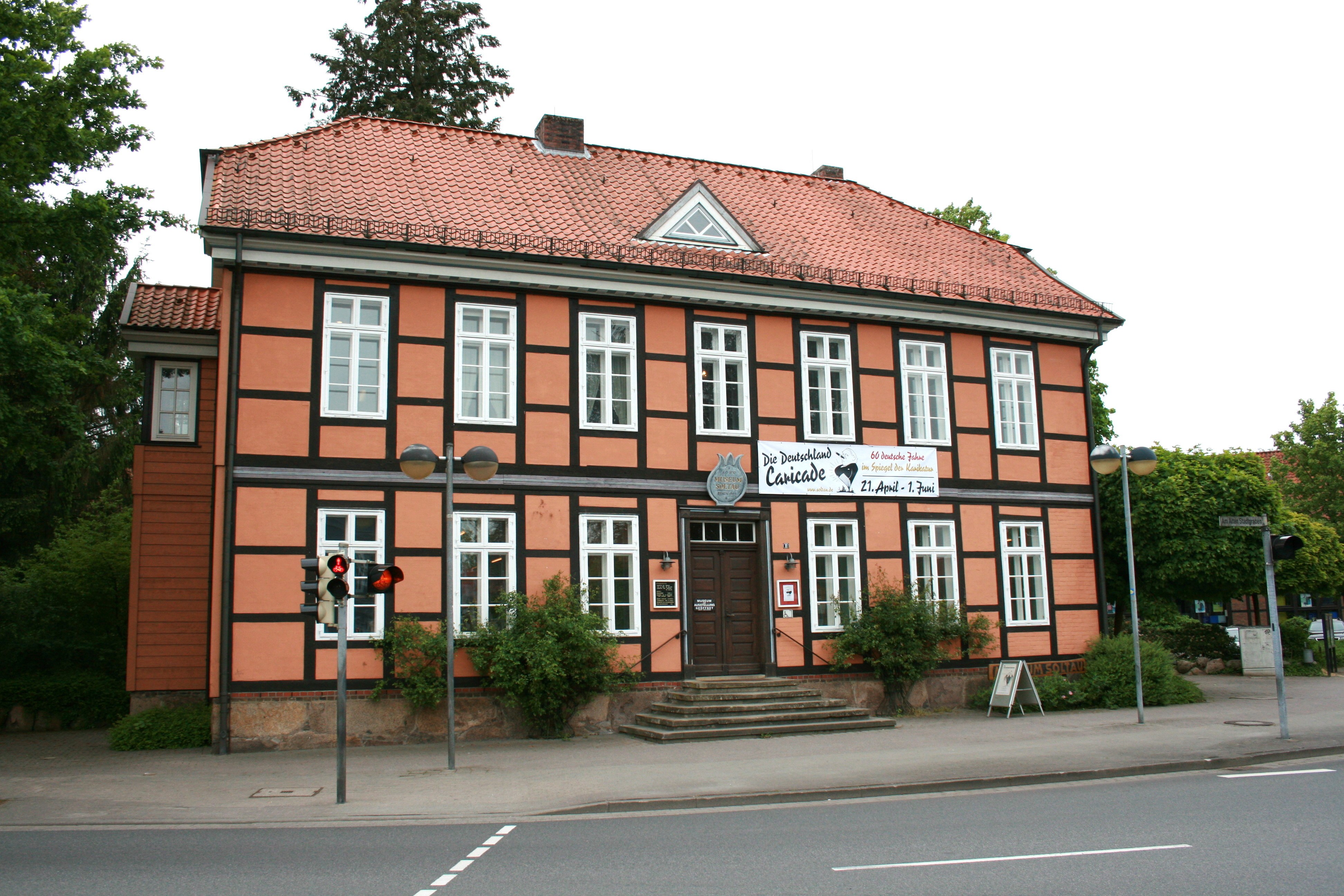 Museum Soltau, Poststraße 11 in Soltau